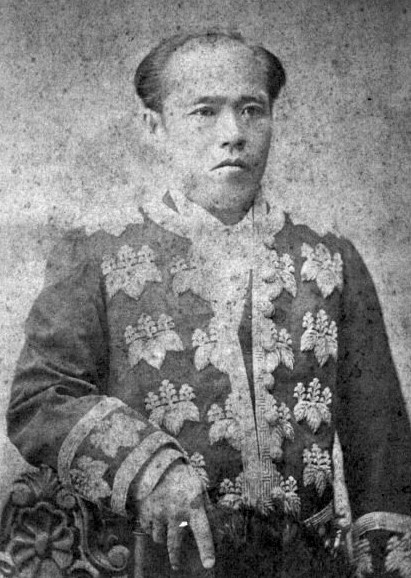 徳川茂承の肖像写真。